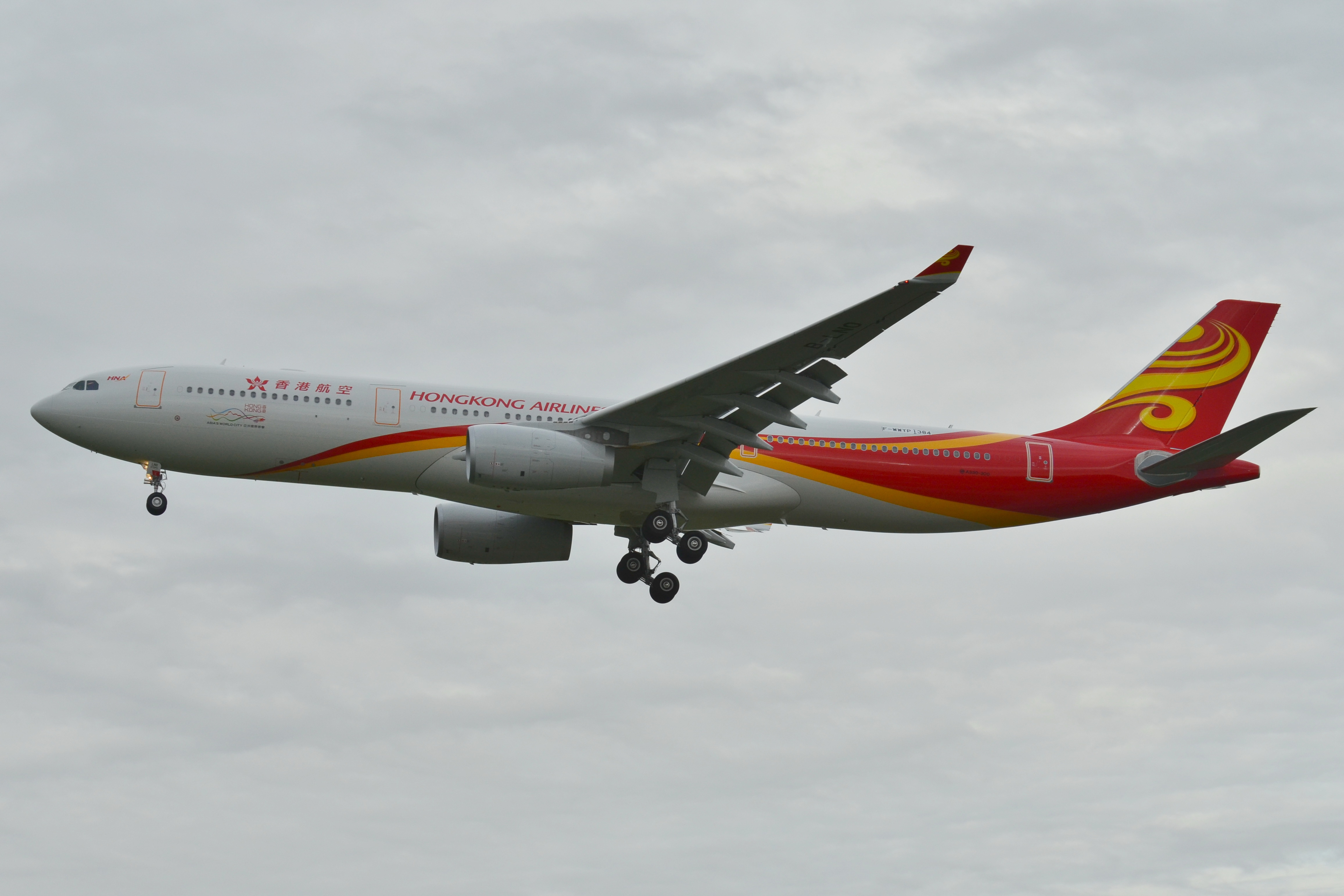 Photo prise à l'aéroport de Toulouse-Blagnac (LFBO) en France. Picture take at Toulouse-Blagnac Airport (LFBO) in France.